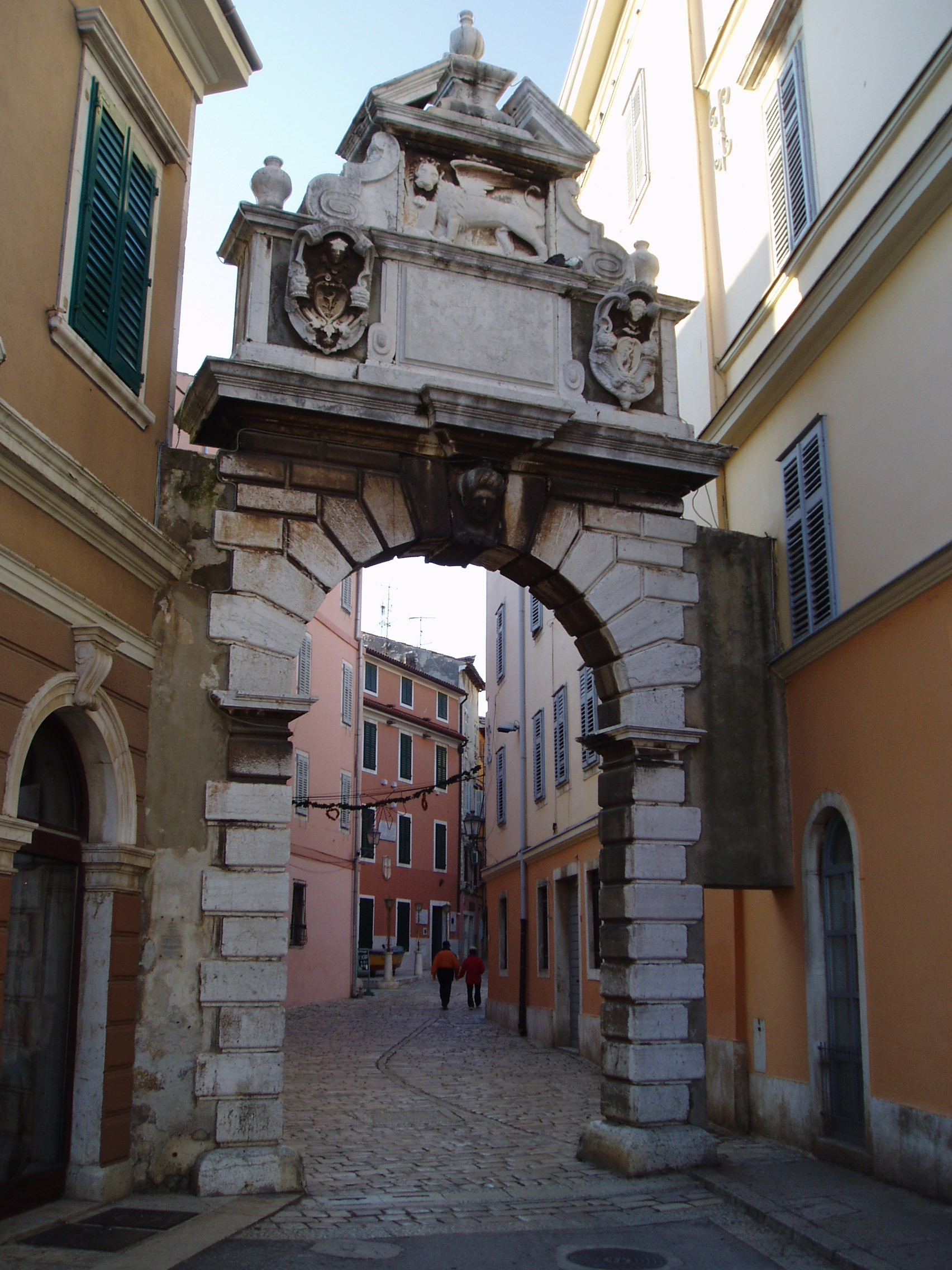 Balbi's Arch